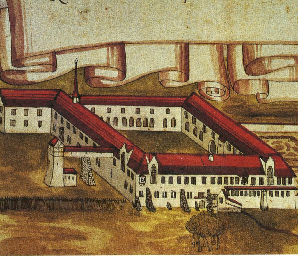 Kloster Mariaberg in Rorschach